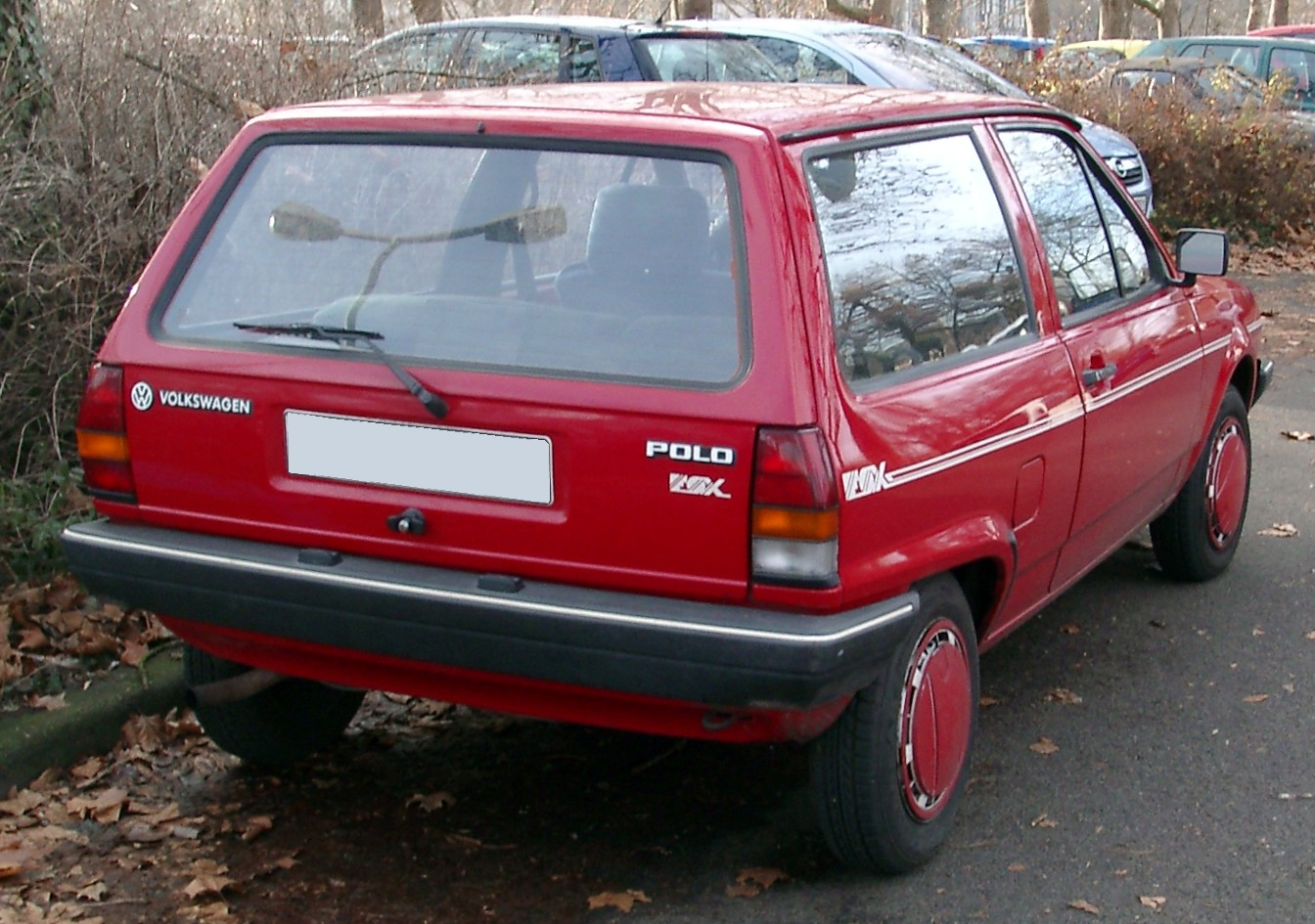 VW Polo II